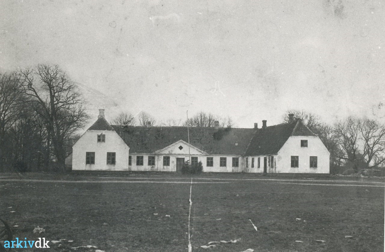 Gammel Høstemark, stadig med den nordlige fløj.